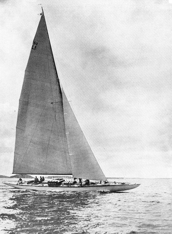 Singoalla på Kanholmsfjärden. Konstruktör: Gustaf Estlander.